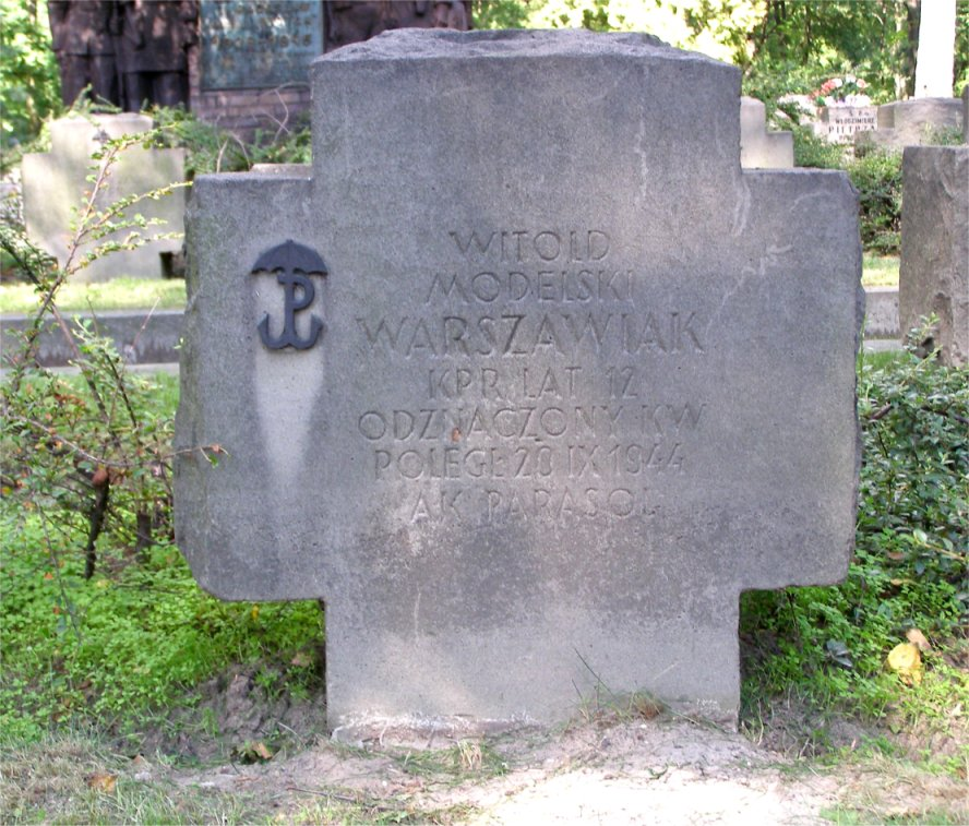 Grób Witolda Modelskiego na Powązkach Wojskowych w Warszawie